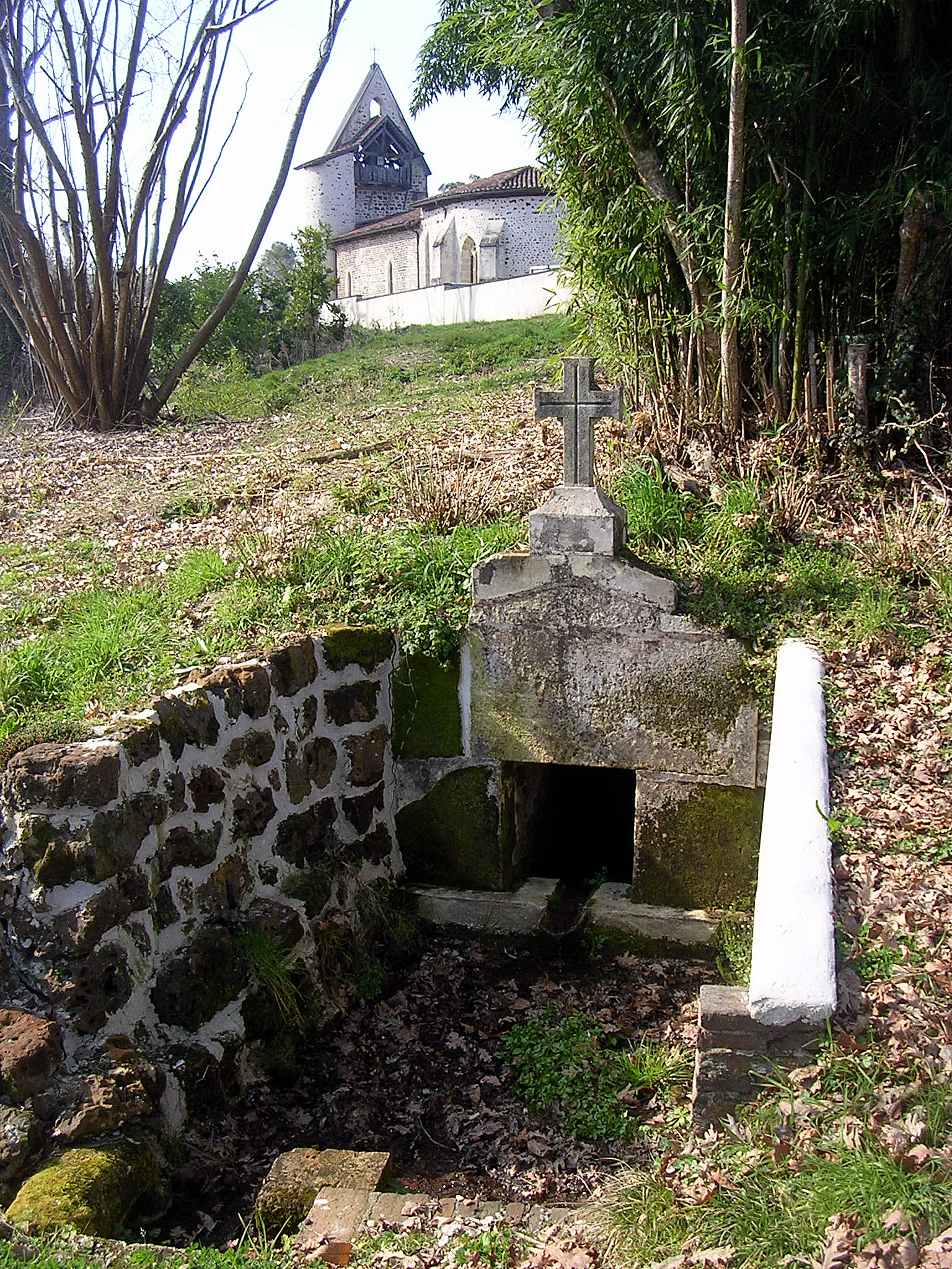 Église Saint-Vincent-de-Xaintes de Belhade vue de la source Sainte-Anne, dans le département français des Landes.